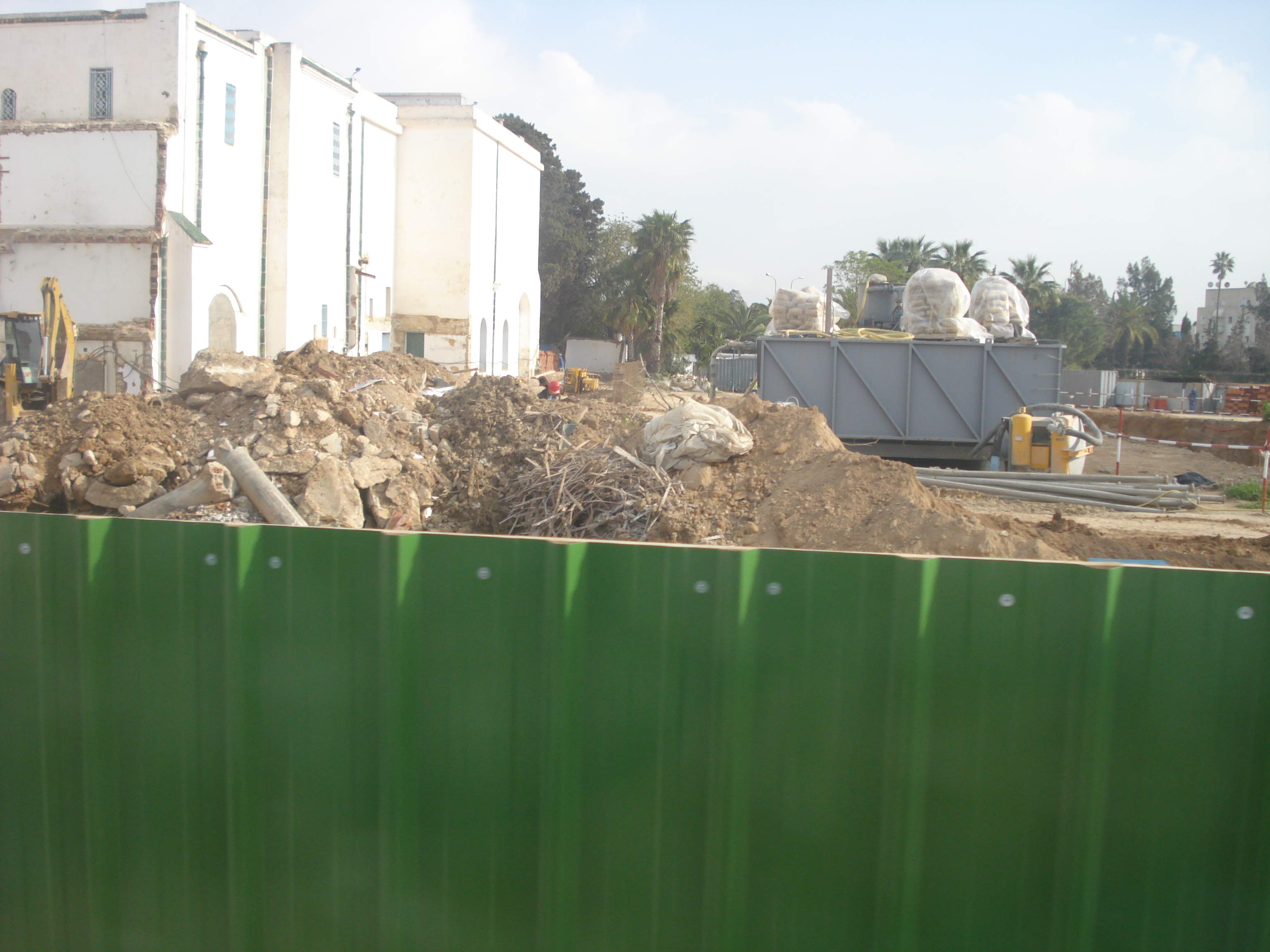 Le Musée national du Bardo (Tunisie) en travaux